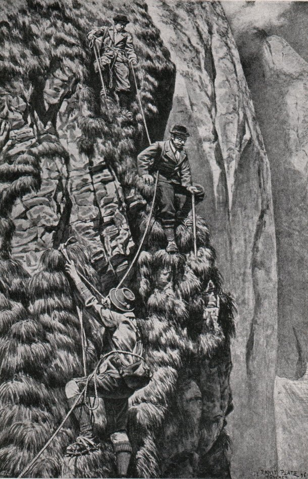 Abstieg vom Höfats-Ostgipfel.